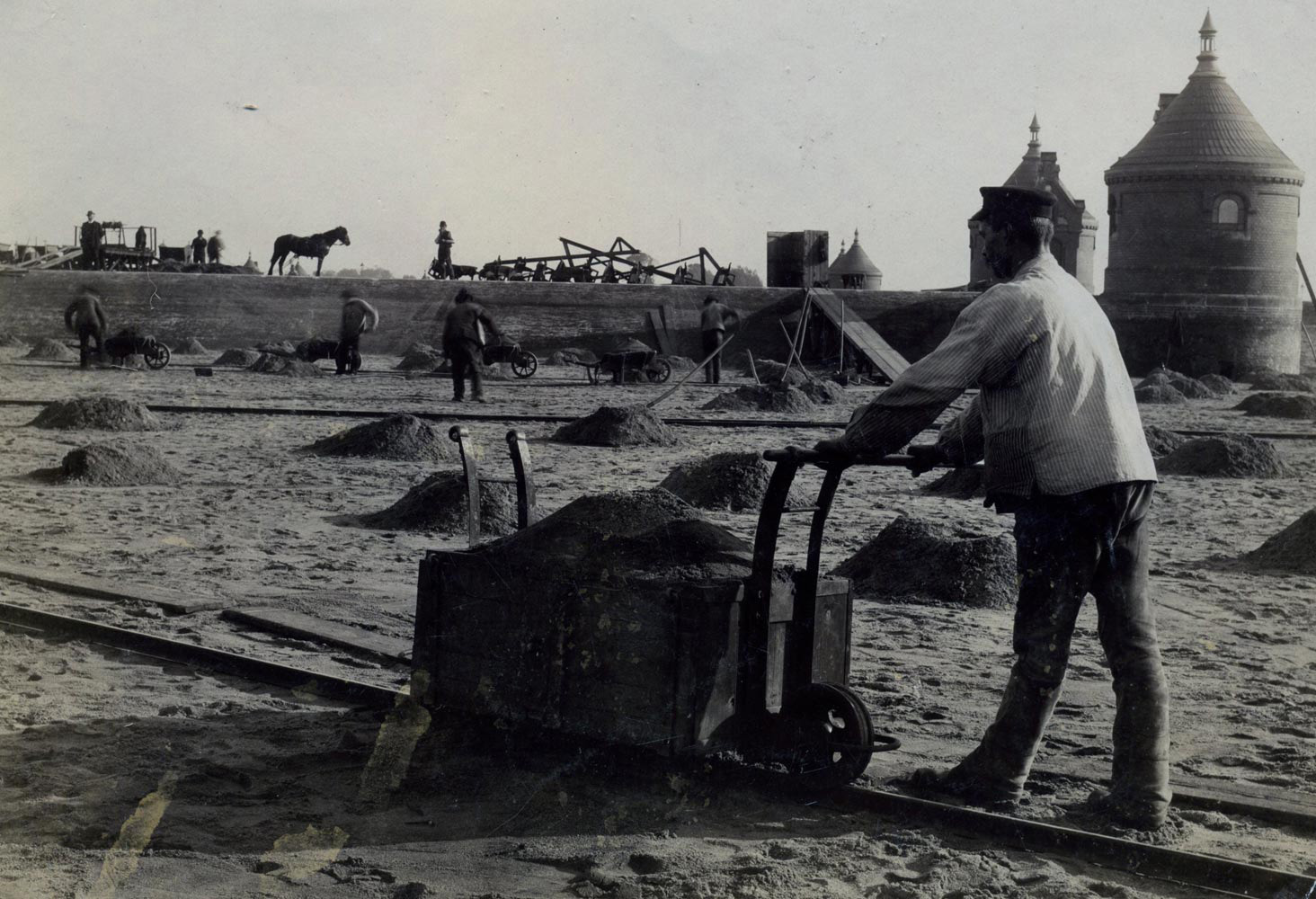 Arbeiter beim Bau der Filtrationsanlage im Wasserwerk Kaltehofe. This is a photograph of an architectural monument.